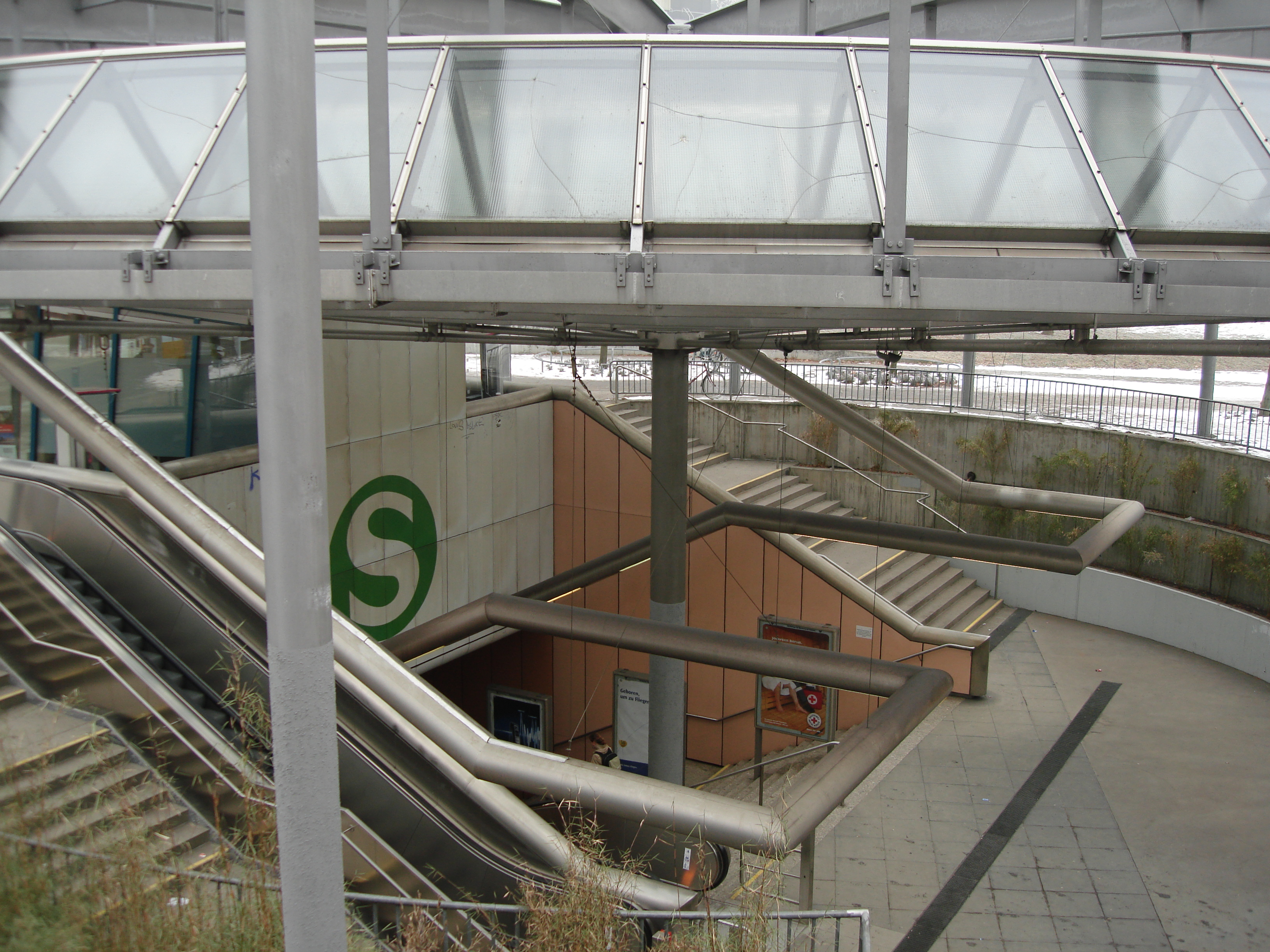 S-Bahn-Station, Universität Stuttgart, Vaihingen date: 03.02.2006 by: Christoph Hoffmann